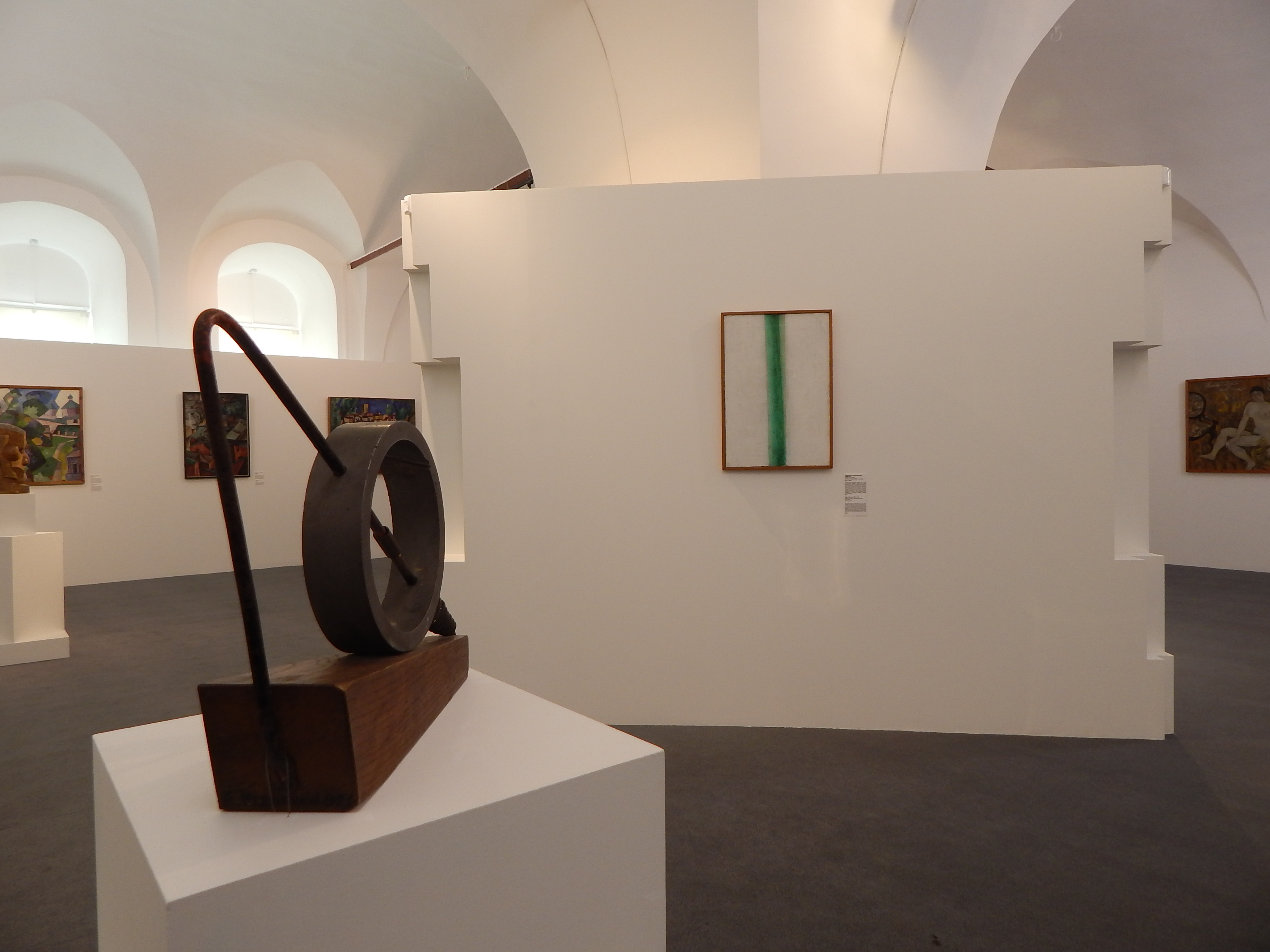 Картина О. Розановой "Зеленая полоса" на выставке "Хвост кометы" в ГМЗ "Ростовский кремль" (2018-2019)